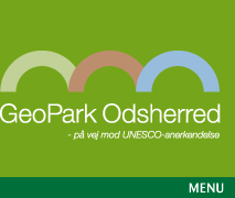 Odsherred Geopark logo